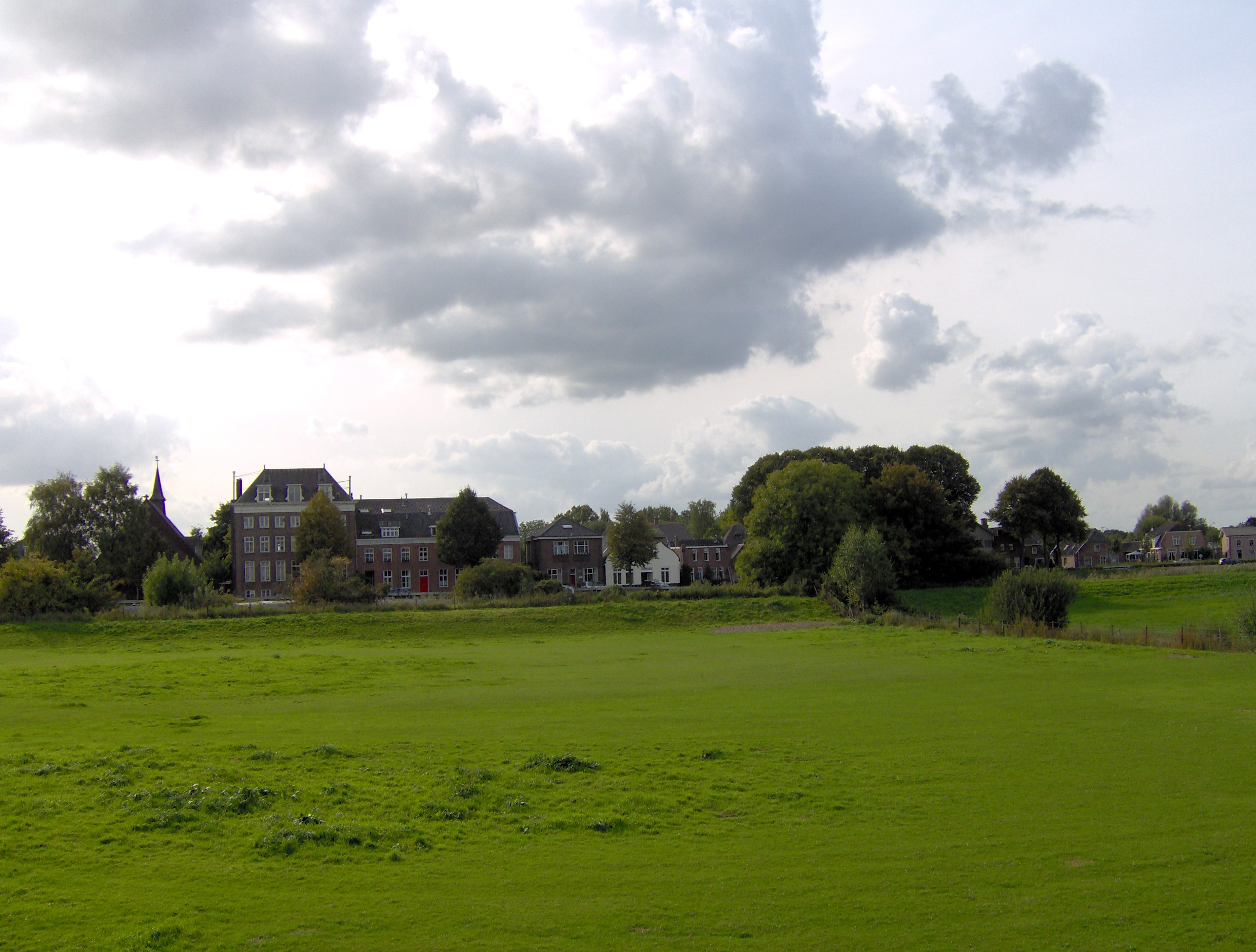 eigen foto